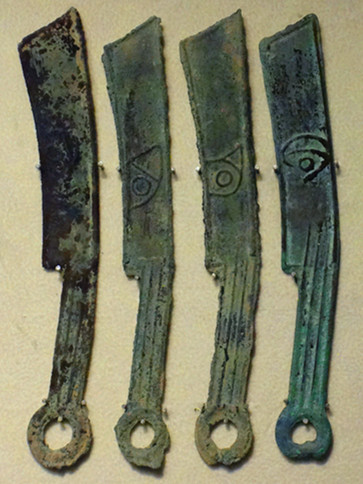 燕明刀，中国钱币学博物馆